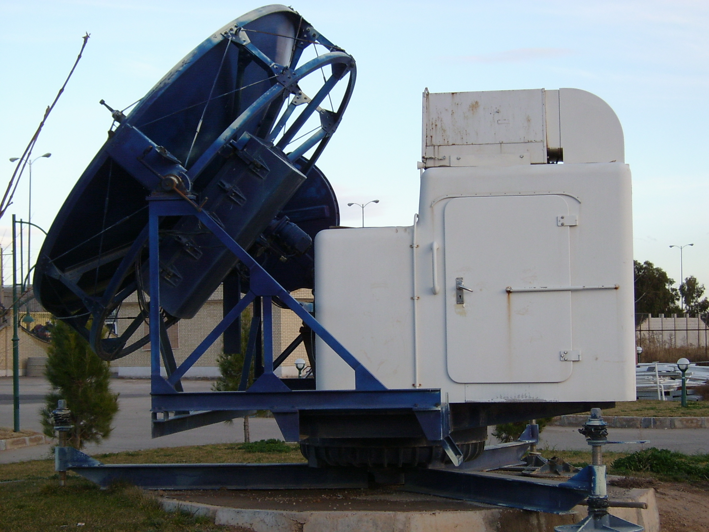 این رادار در سال های ۱۳۴۰ تا ۱۳۷۴ در هواشناسی ایران مورد استفاده قرار می گرفت. به کمک این رادار بالون هواشناسی در آسمان تعقیب می شد و به کمک اطلاعات موقعیت زاویه ای به دست آمده از آن برای بالون در هر یک دقیقه، امکان محاسبه سرعت و سمت باد در لایه های بالایی جوّ فراهم می شد.